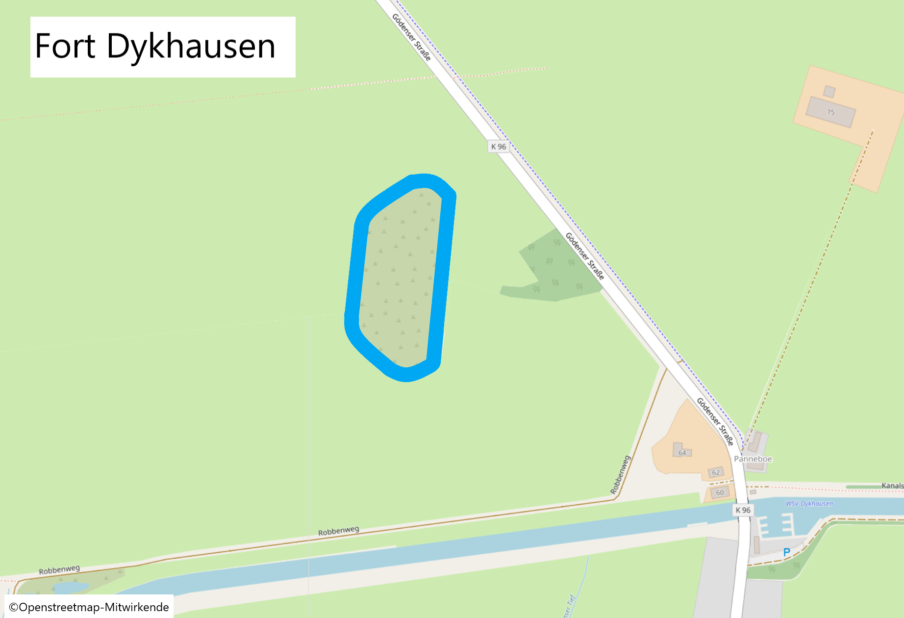 Lage und Umfang des Forts Dykhausen